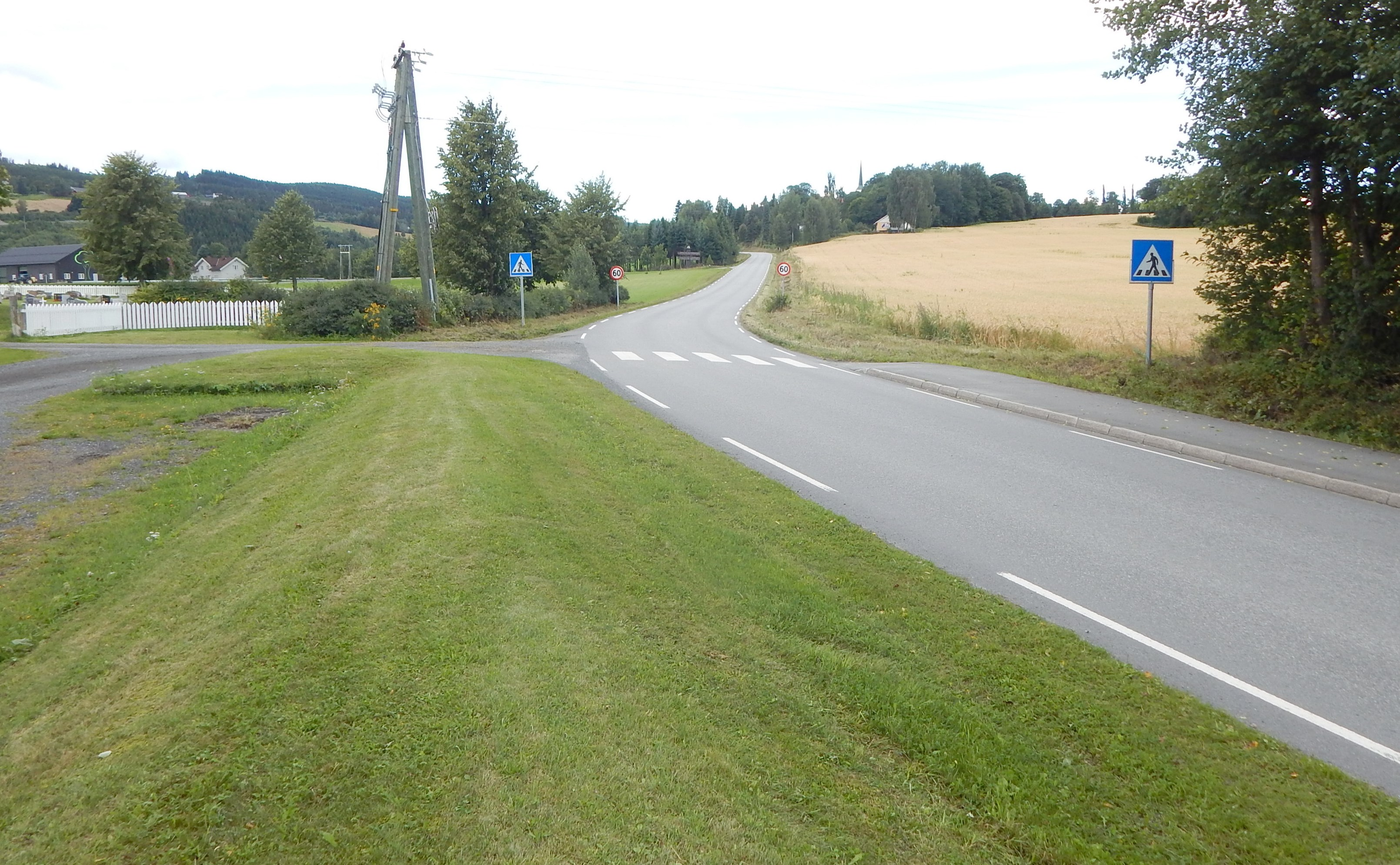 Øverbygdsvegen (fylkesvei 2420, tidl. 168) forbi Biri kirkegård